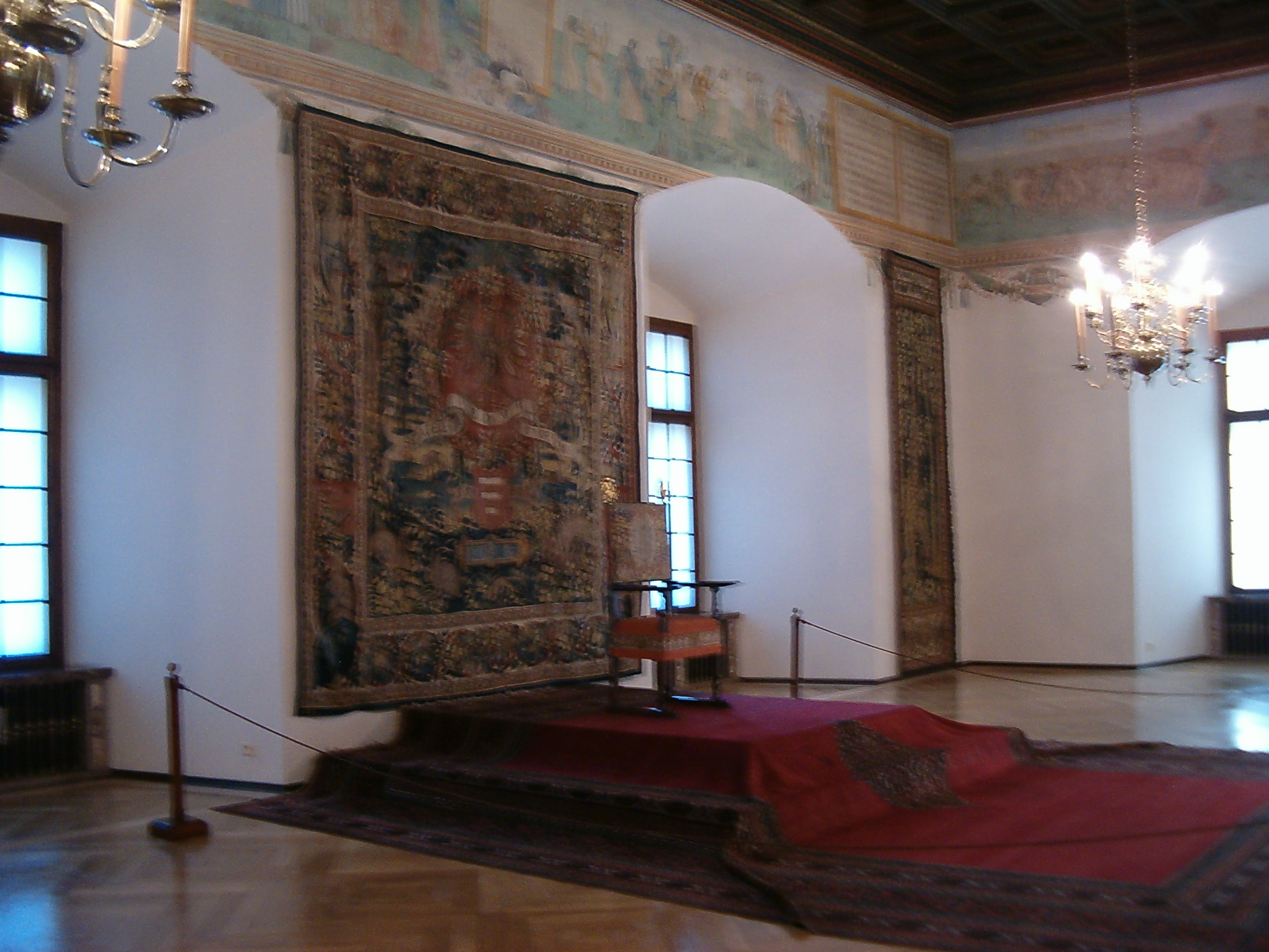 Sala Poselska w Zamku Królewskim na Wawelu